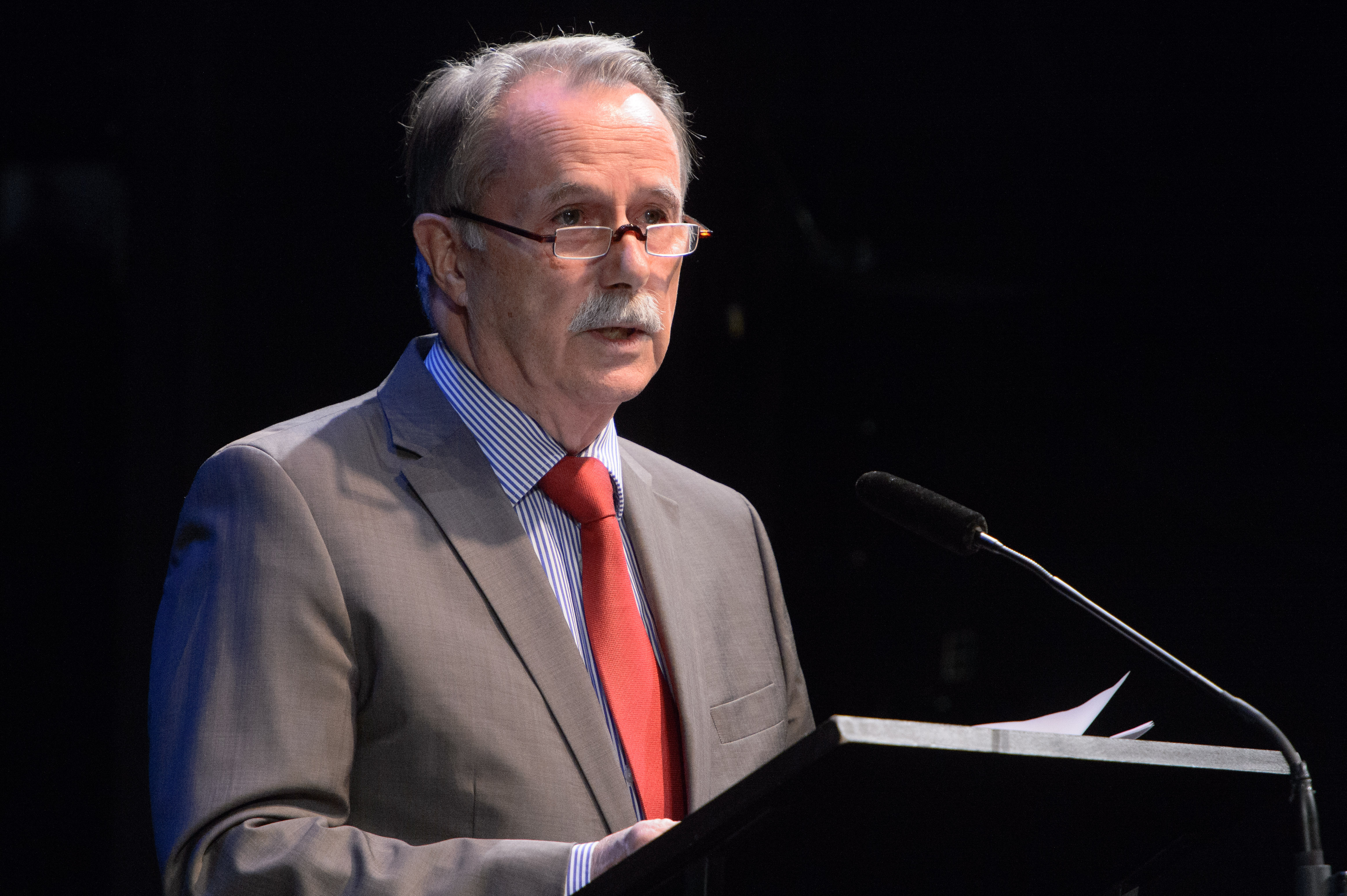 Prof. Klaus-Dieter Lehmann (Präsident Goethe Institut), Foto